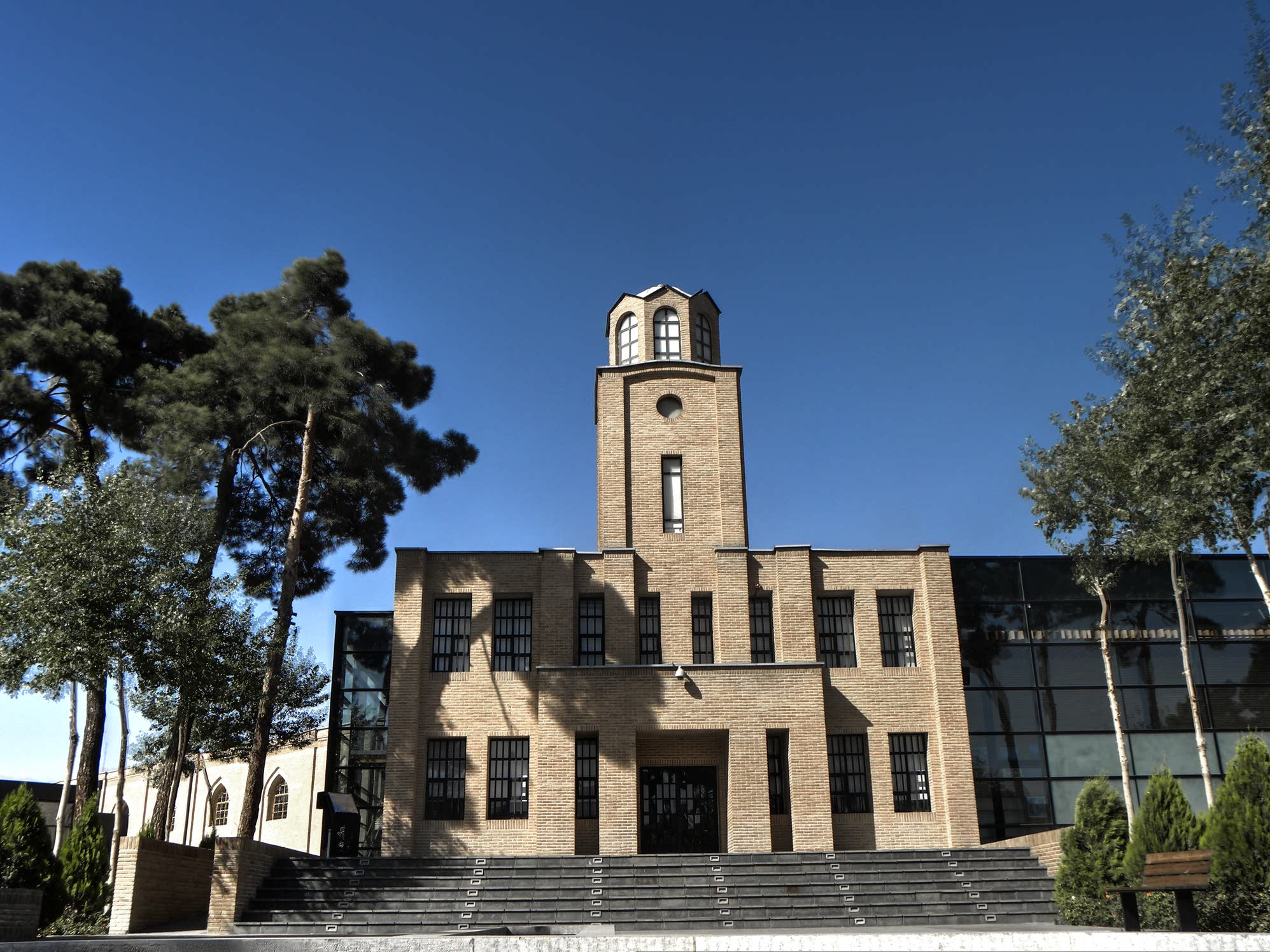 زندان قصر